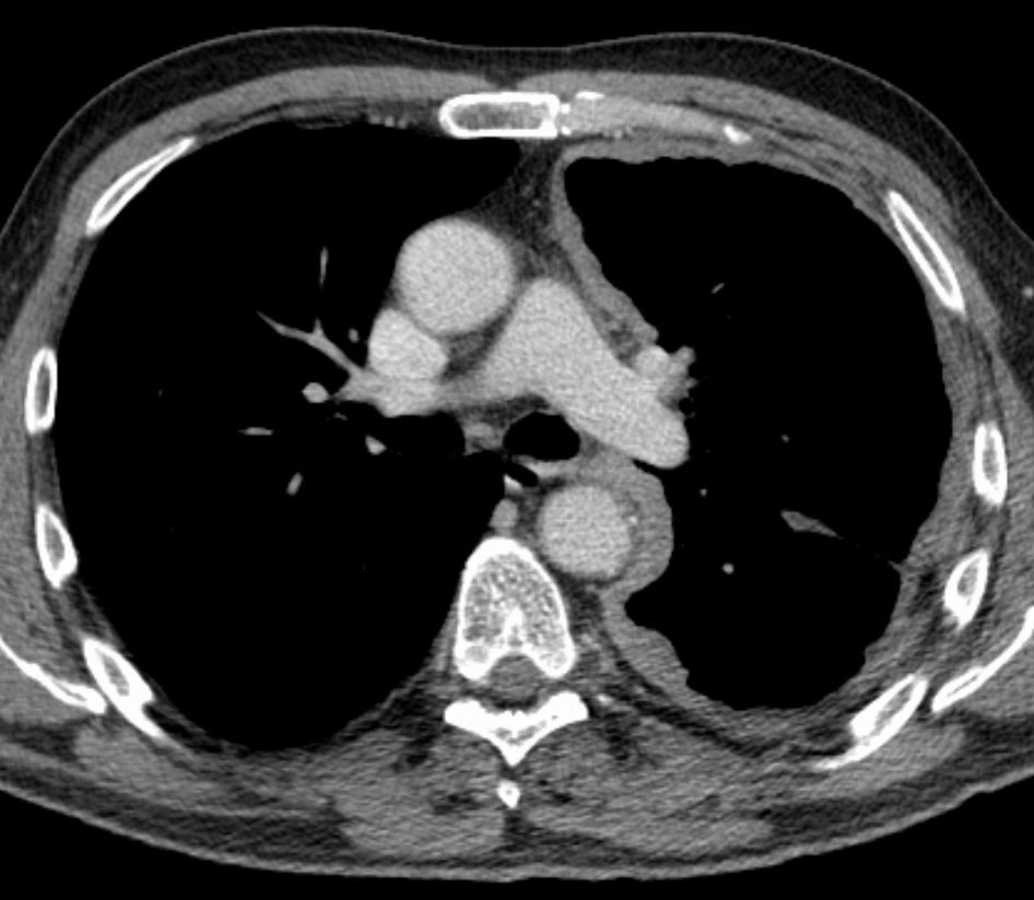 Mesotheliom der Pleura links in der Computertomographie: Mantelförmige Verdickung der Pleura mit Pleuraerguss. Beachte vor allem auch die Ausbreitung an der mediastinalen Seite der Pleura.